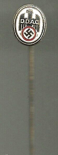 Anstecknadel des DDAC